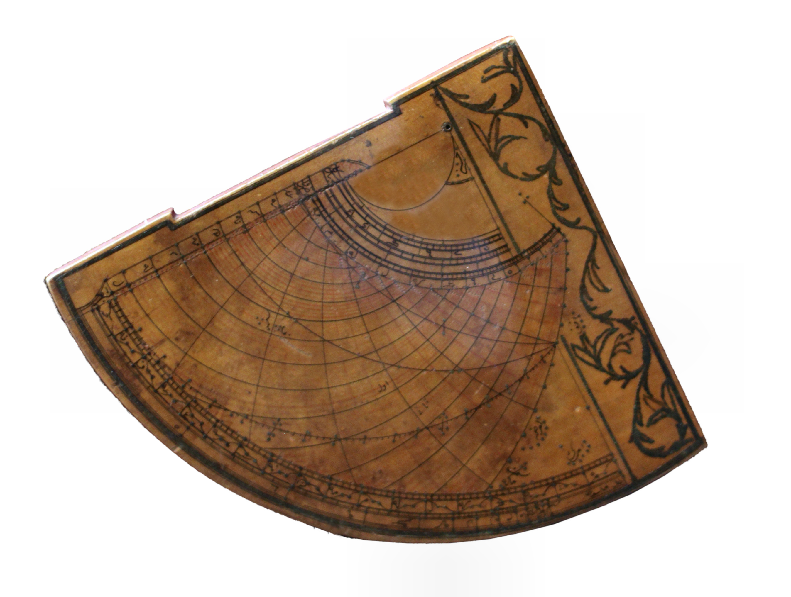 Quadrant ottoman en position d'observation.